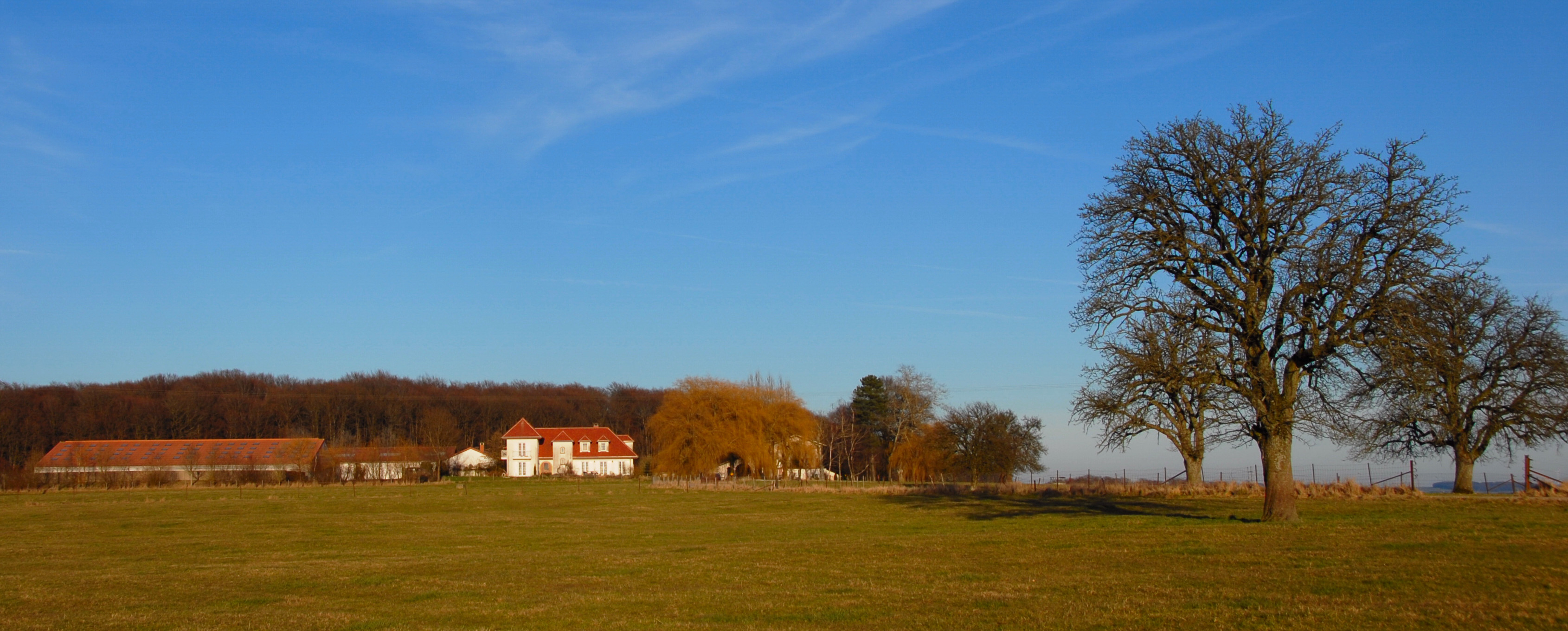 Säitert (Gemeng Bäerdref). Saitert Saitert